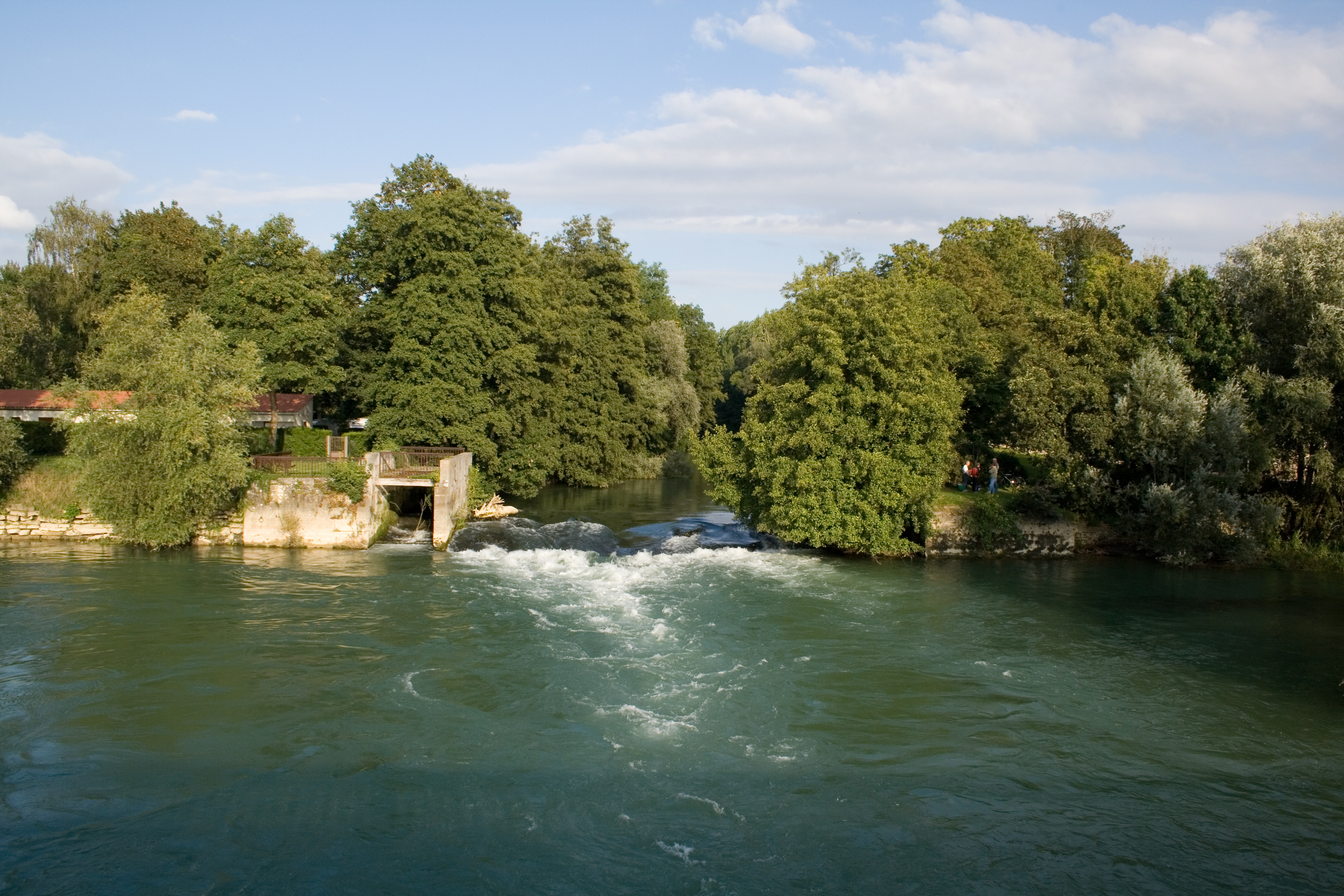 La rivière l'Aube passant à Arcis-sur-Aube